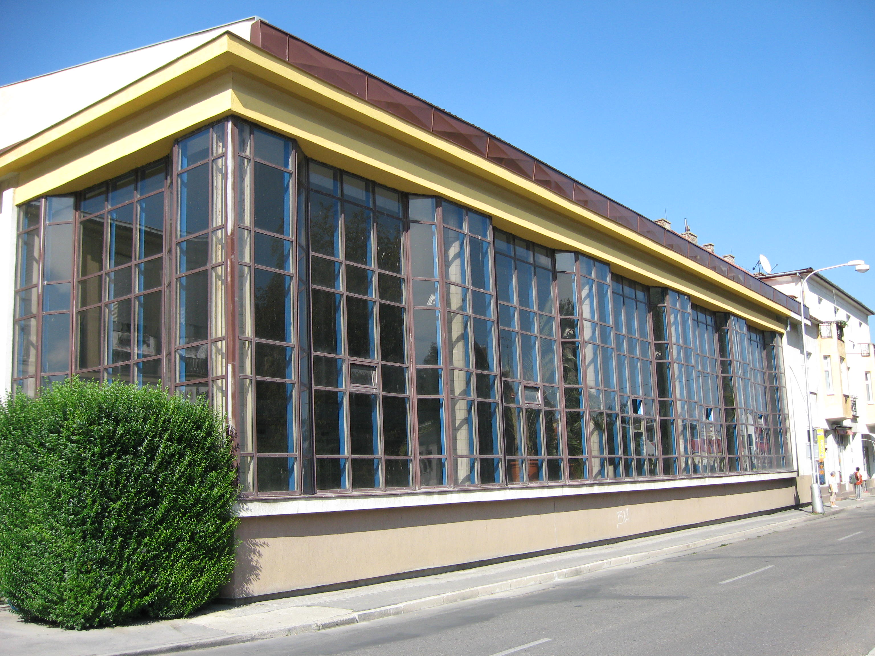 Swimming pool in Nové Zámky